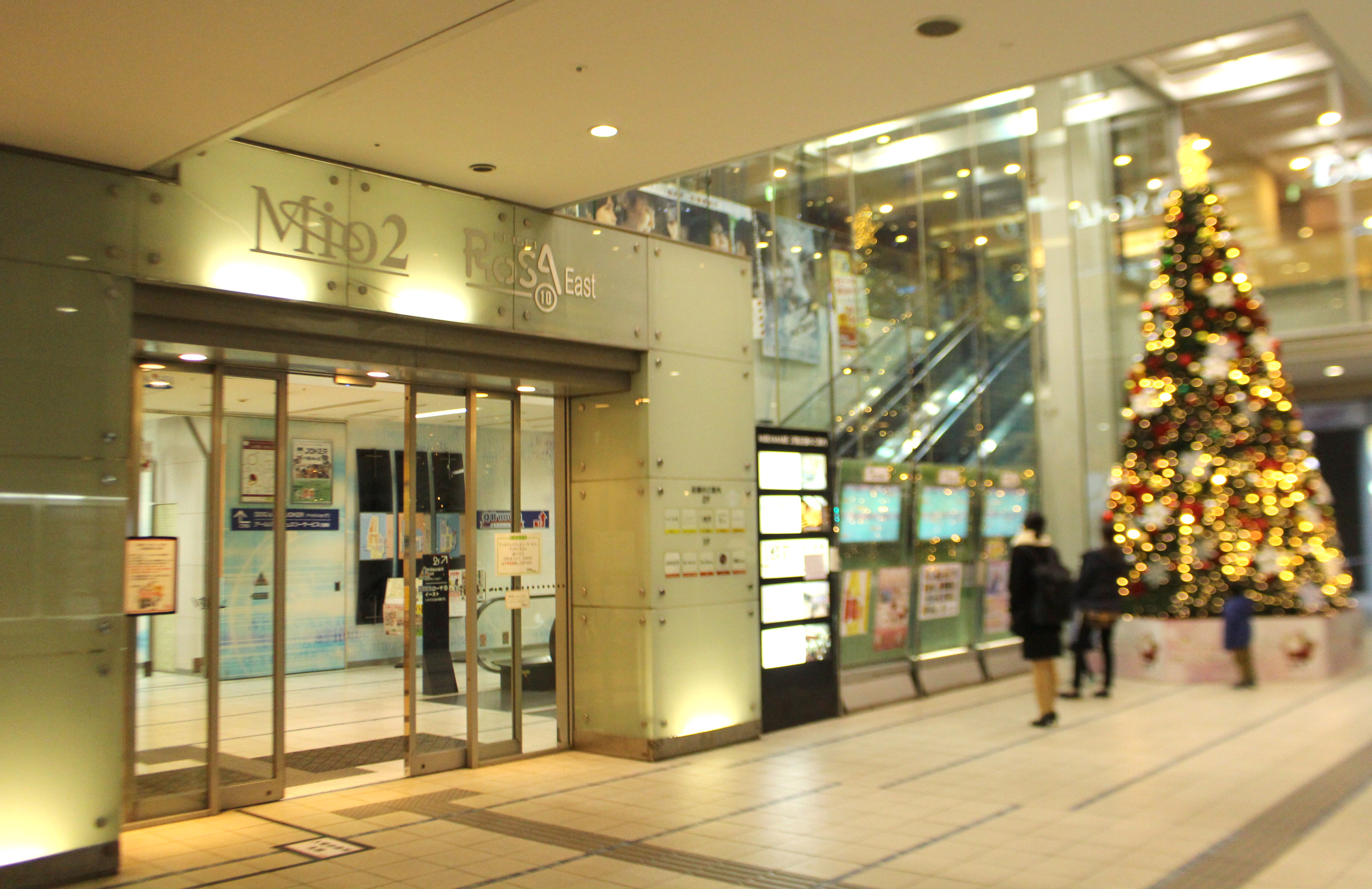 千葉中央駅の商業施設 ミーオ2